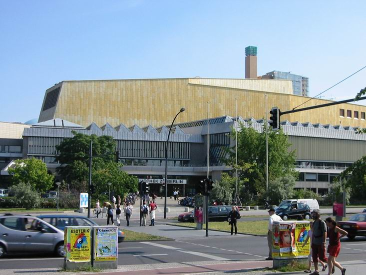 Neue Staatsbibliothek Berlin (House 2), Potsdamer Str.